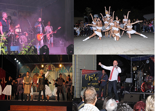 Mikepércsi fesztivál képei